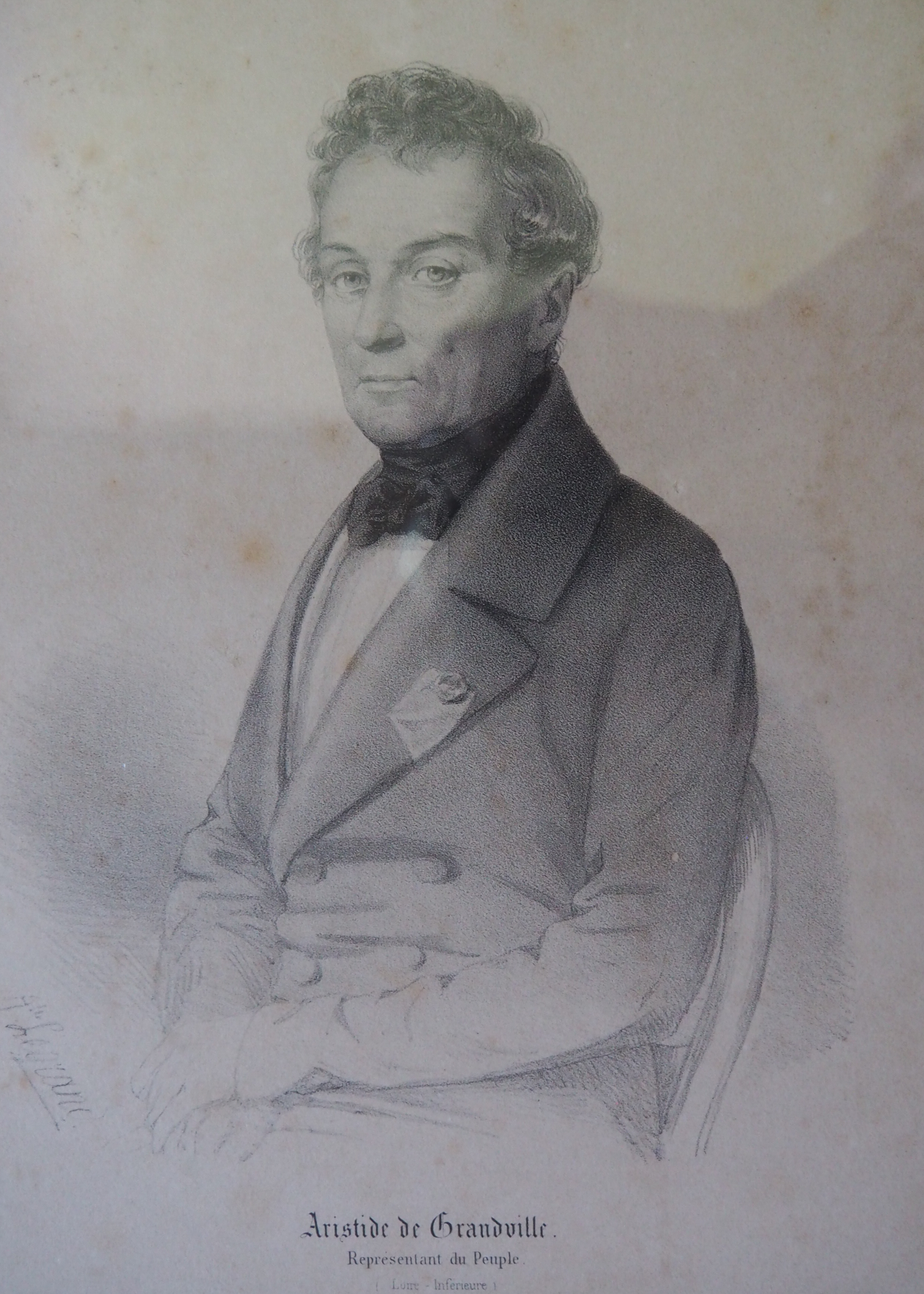 Aristide